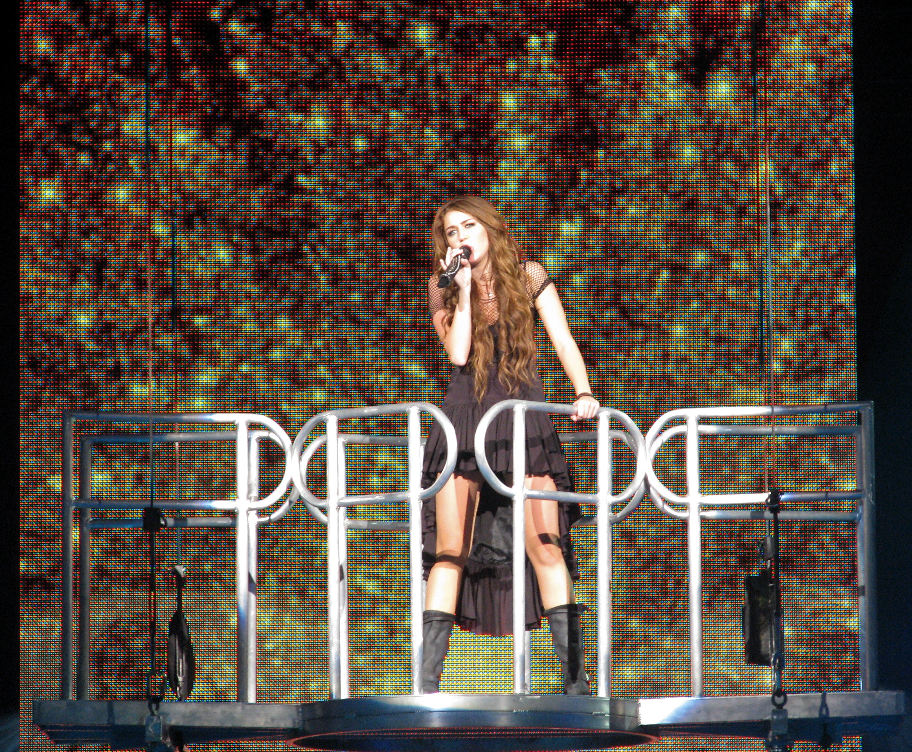 A teen singing.